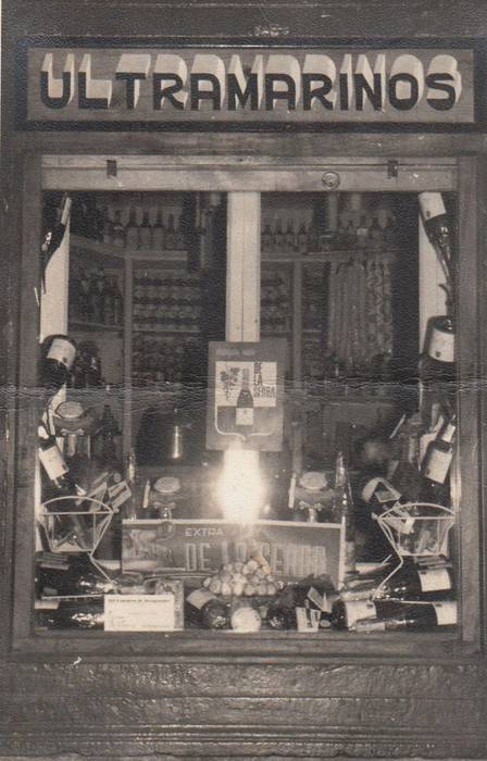 Joxepa Zubeldia bertsolariaren Hernaniko denda